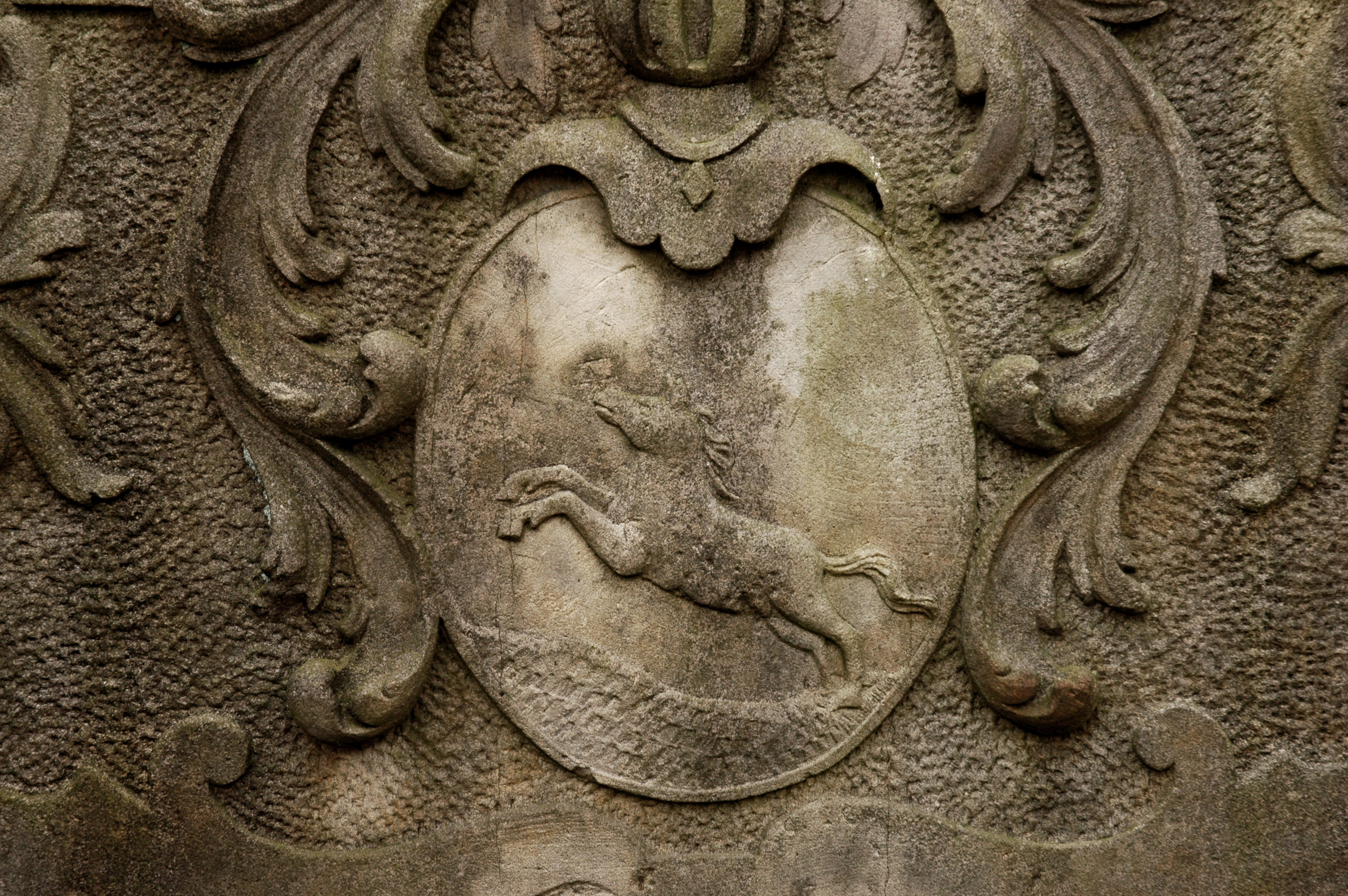 Grabstein der Familie Plate auf dem Hasberger Friedhof (Delmenhorst)